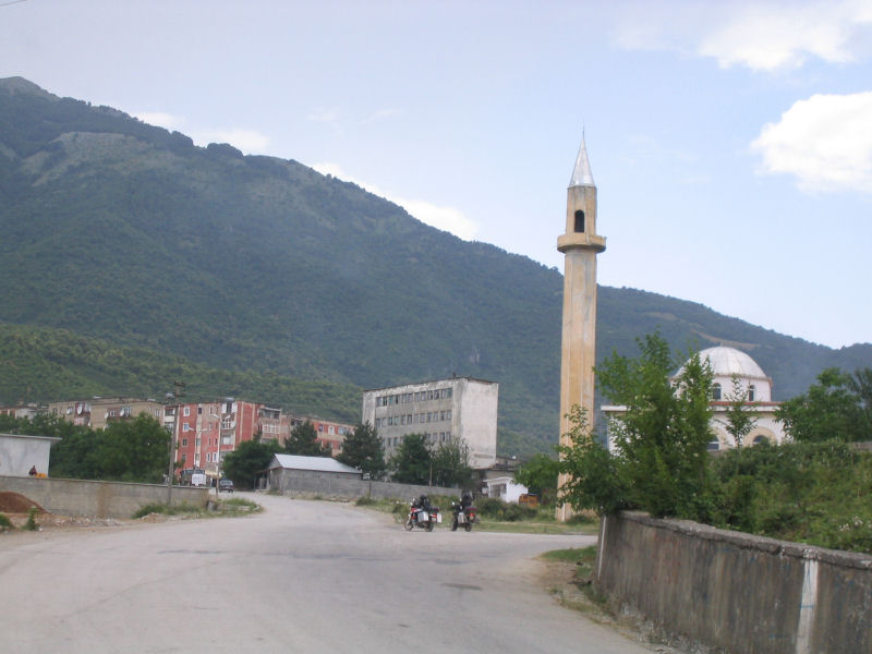 Bajram Curri (Albania)